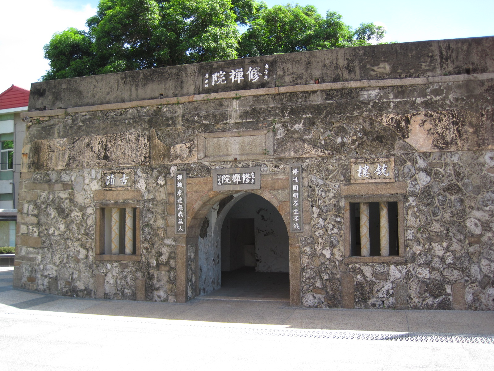 臺南巽方砲臺